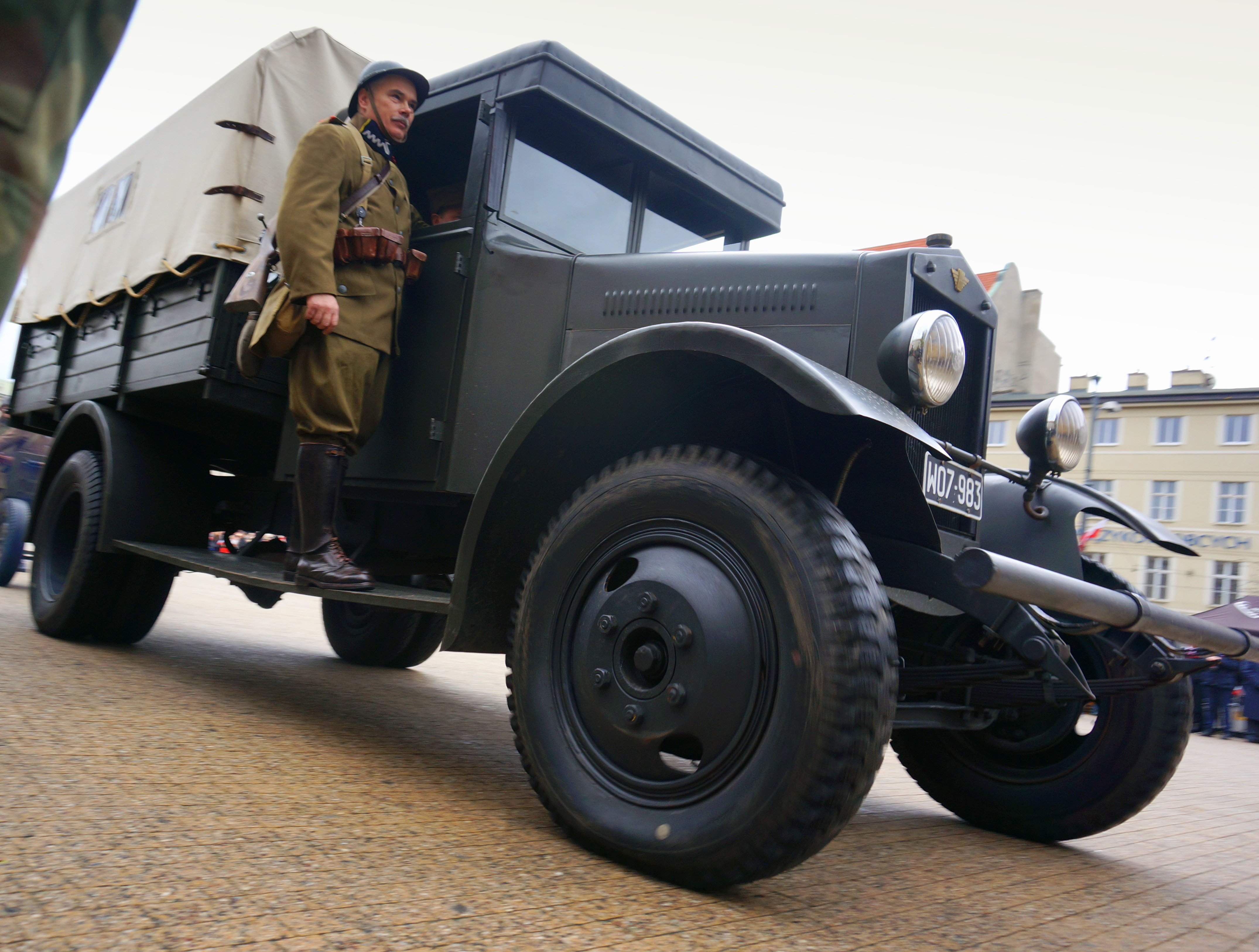 Poznań. Polski Fiat PF-621L (replika) podczas prezentacji w dniu Narodowego Święta Niepodległości. Pojazd został zrekonstruowany przez członków Wronieckiego Stowarzyszenia Historycznego - Historica.